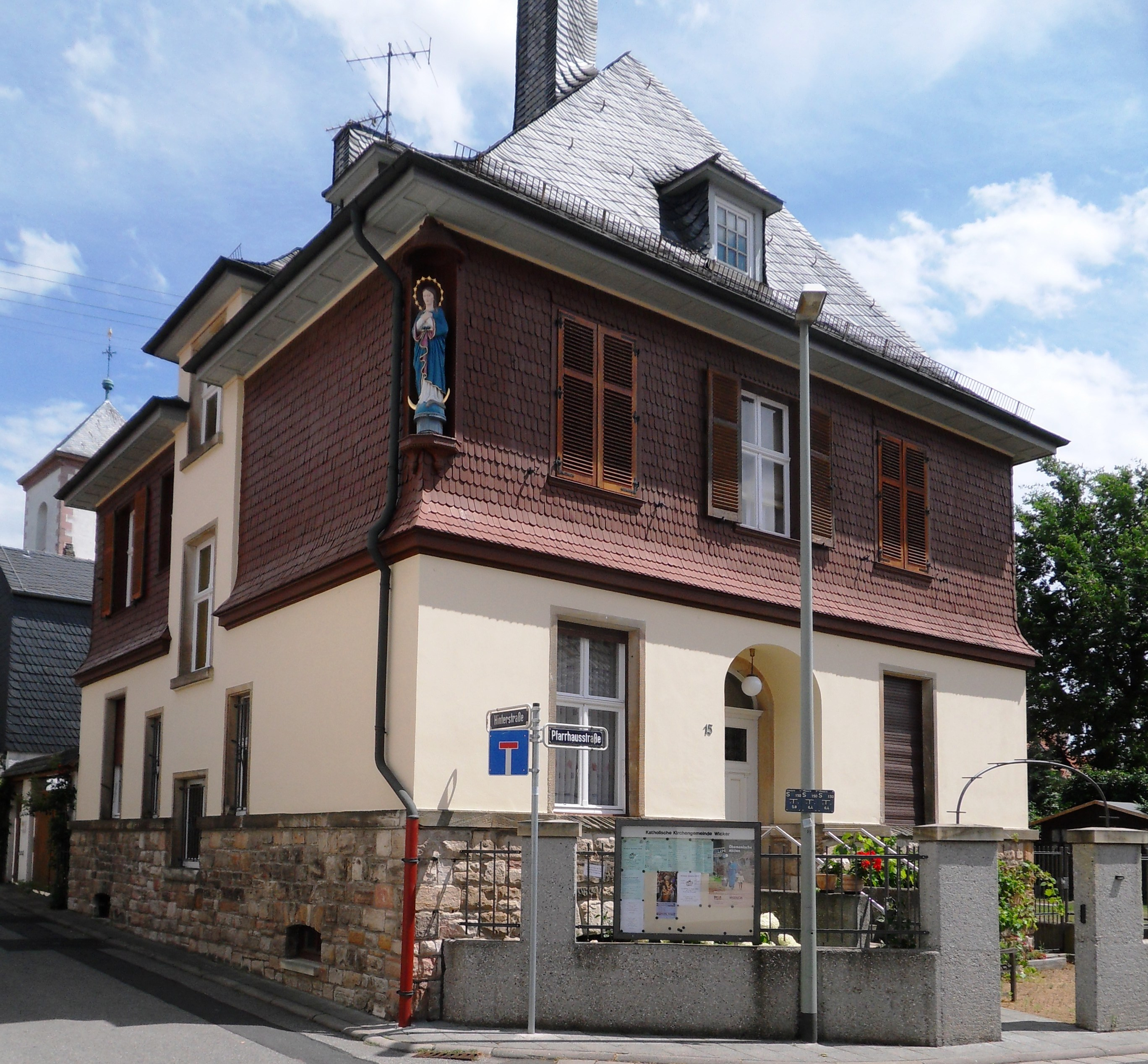 Das katholische Pfarrhaus von 1907 in Wicker steht unter Denkmalschutz